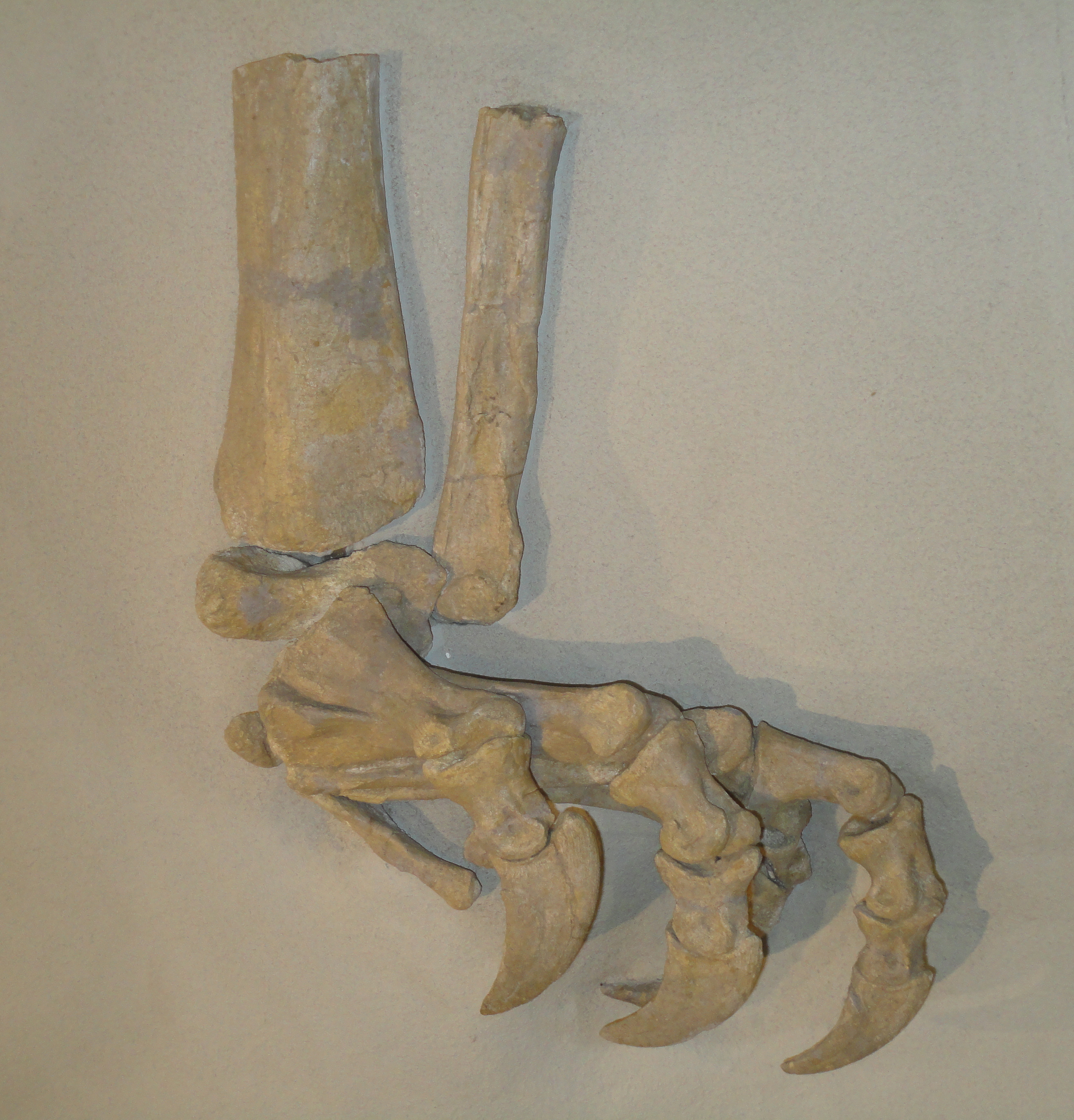 Fuss eines Plateosauriers aus Frick, aufgenommen 2015